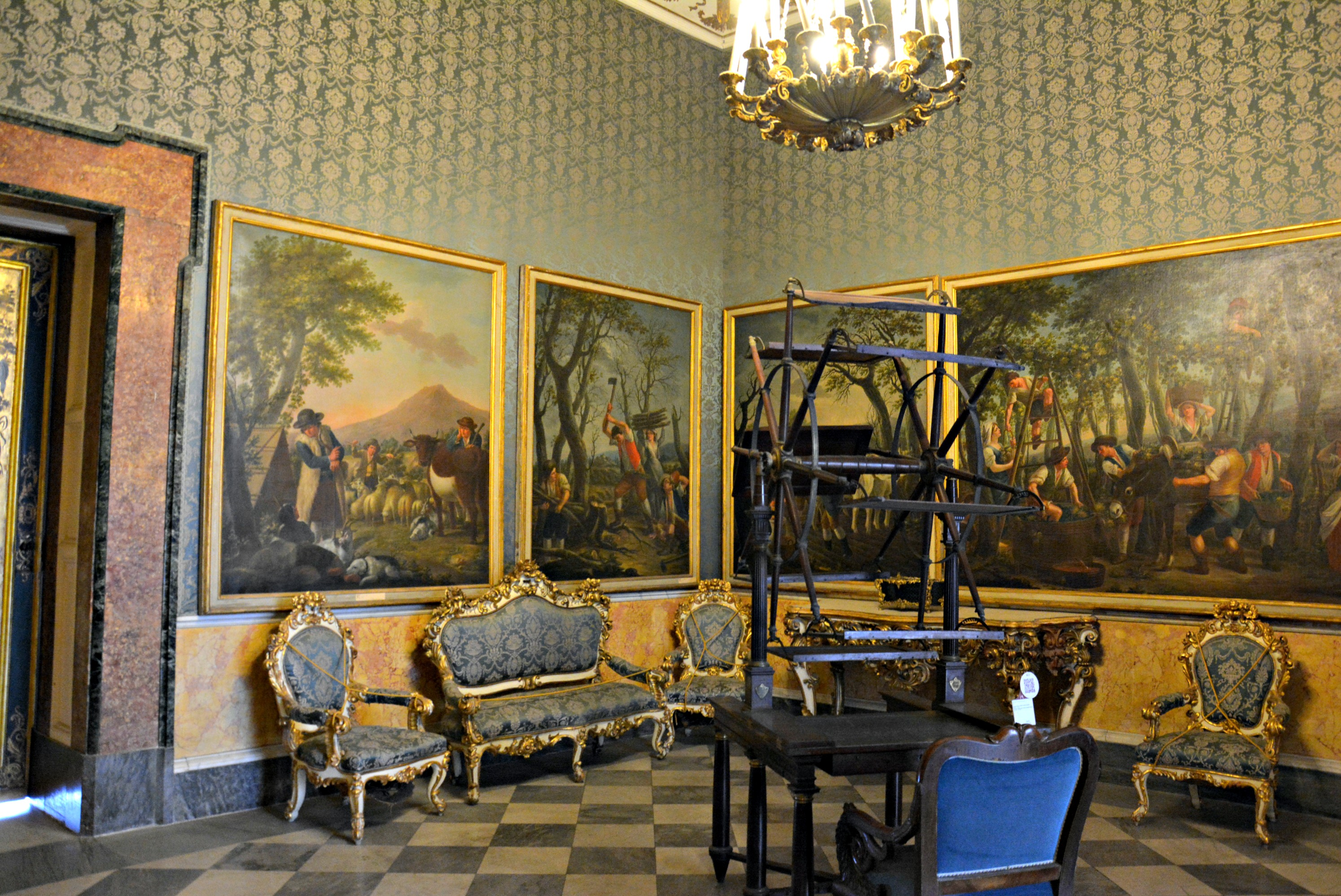 Vedi titolo